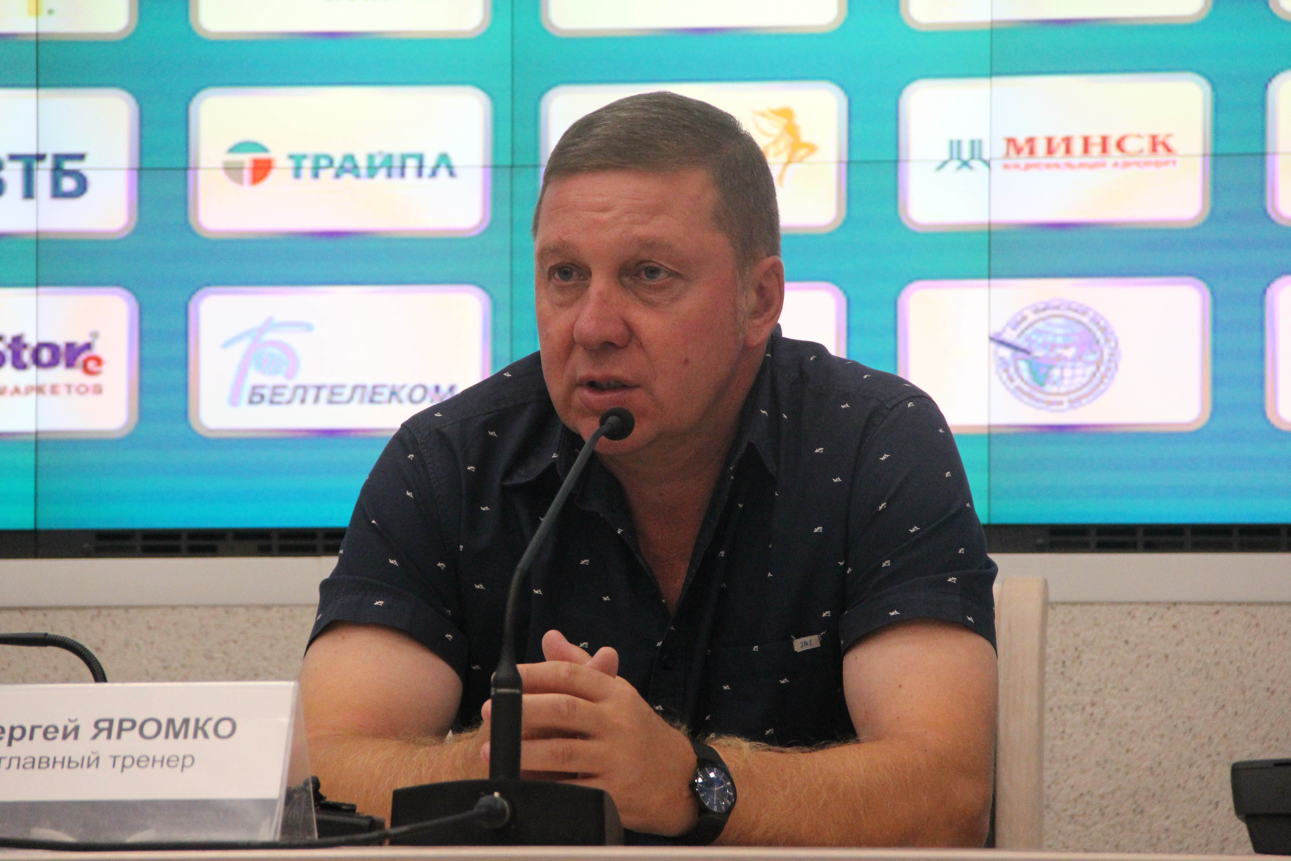 Сергей Яромко на пресс-конференции после матча с ФК "Динамо-Минск" (2:0)